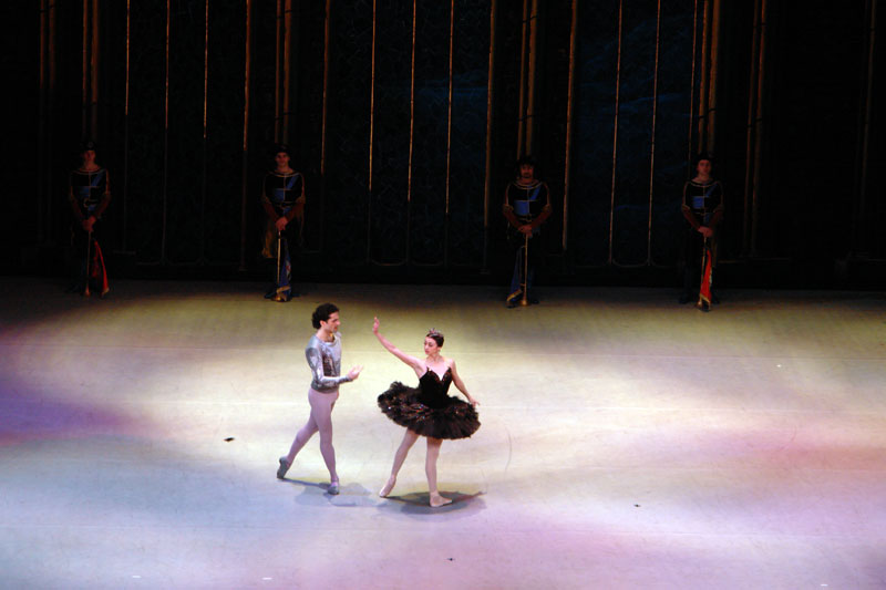 Nino Ananiashvili in Swan Lake ballet